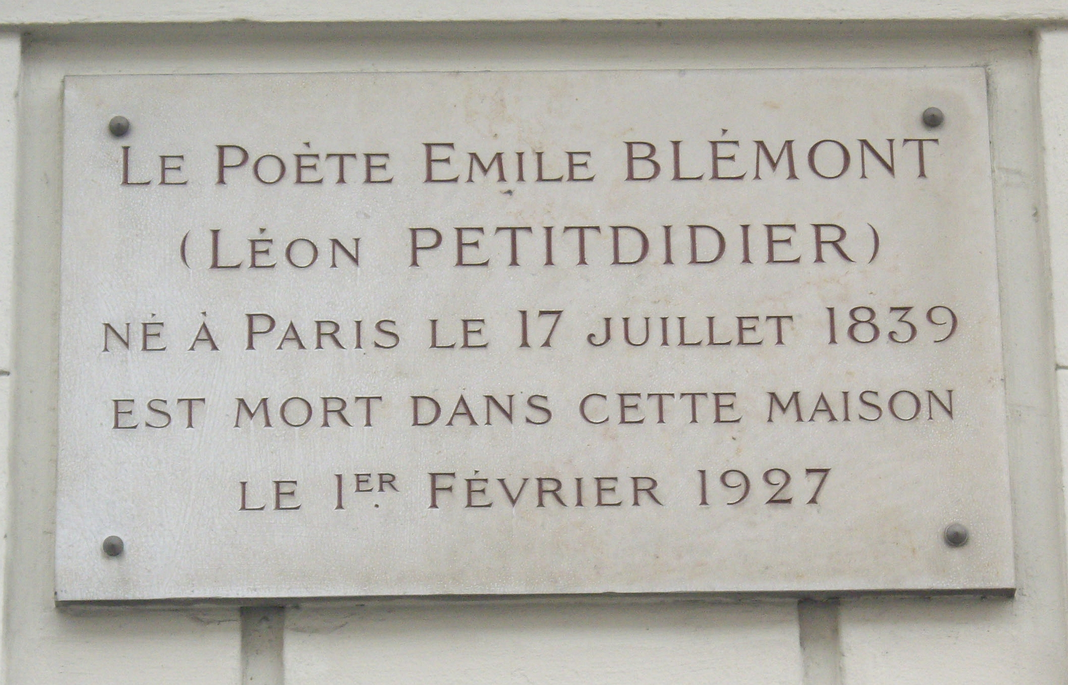 Plaque apposée au n° 11 bis de la rue Ballu, Paris 9e, où mourut le poète Émile Blémont (1839-1927) le 1er février 1927.